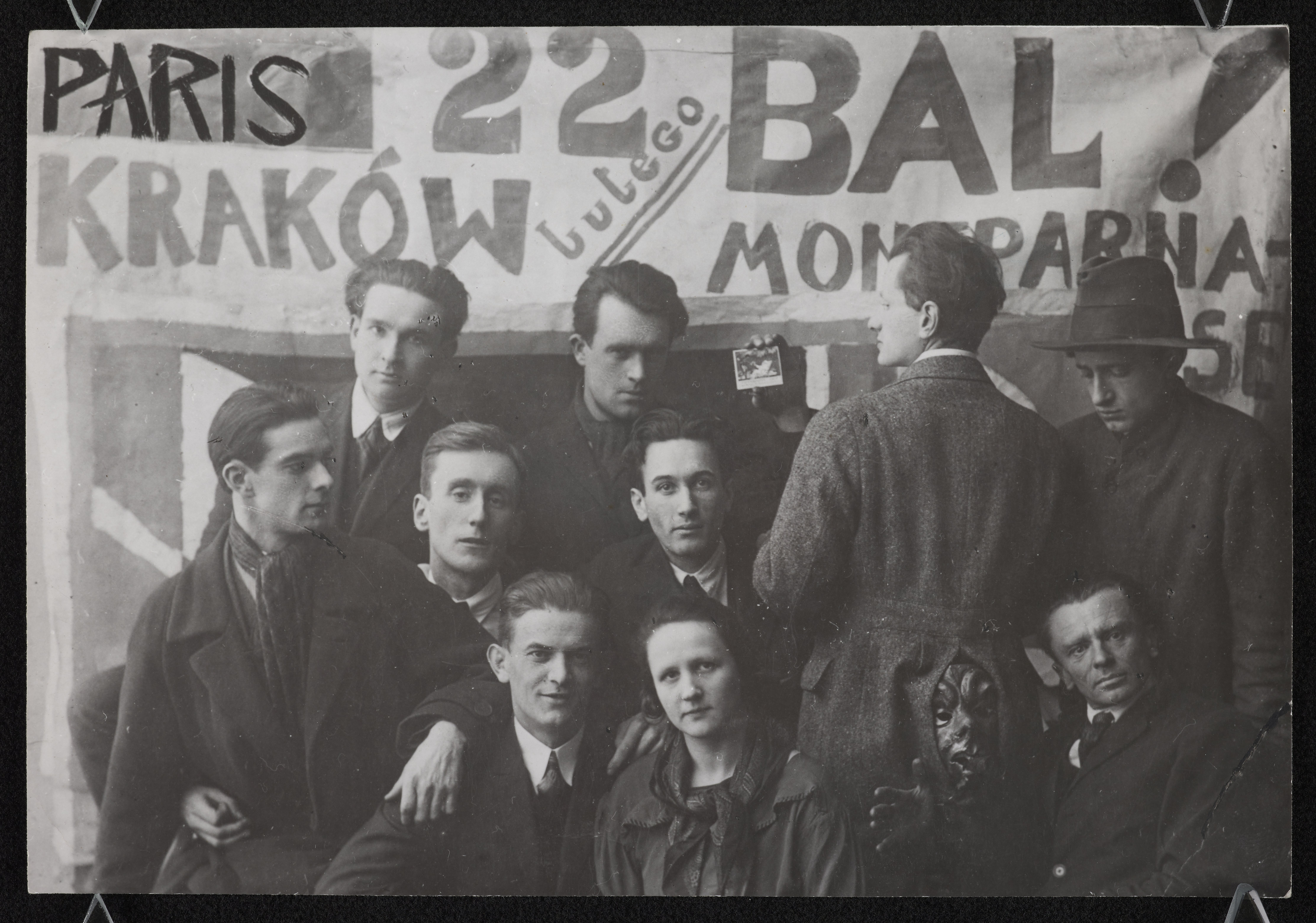 Członkowie grupy artystycznej Komitet Paryski w 1925 roku - widoczni m.in. Hanna Rudzka-Cybis (na dole po prawej), Jan Cybis (na dole po lewej), Józef Czapski, Artur Nacht-Cymborski, Tytus Czyżewski, Zygmunt Waliszewski, Piotr Potworowski, Seweryn Boraczok, Józef Jarema